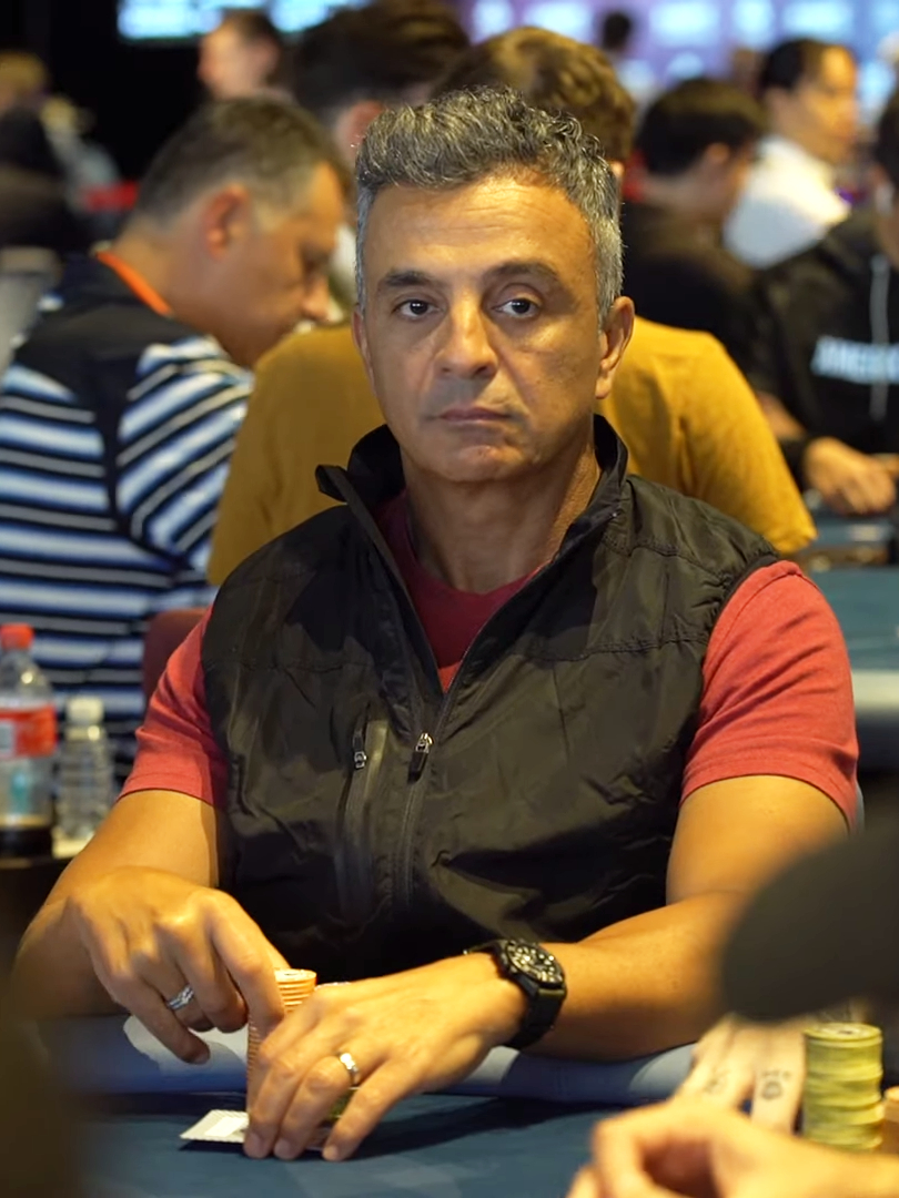 Joe Hachem bei der WPT Australia